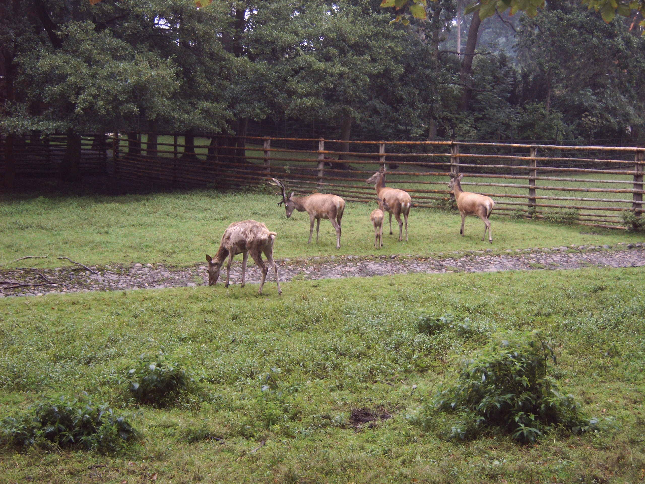 Gehege im Tierpark Klötze, Sachsen-Anhalt, Deutschland Bild aufgenommen am 26.8.2006 durch Olaf Meister